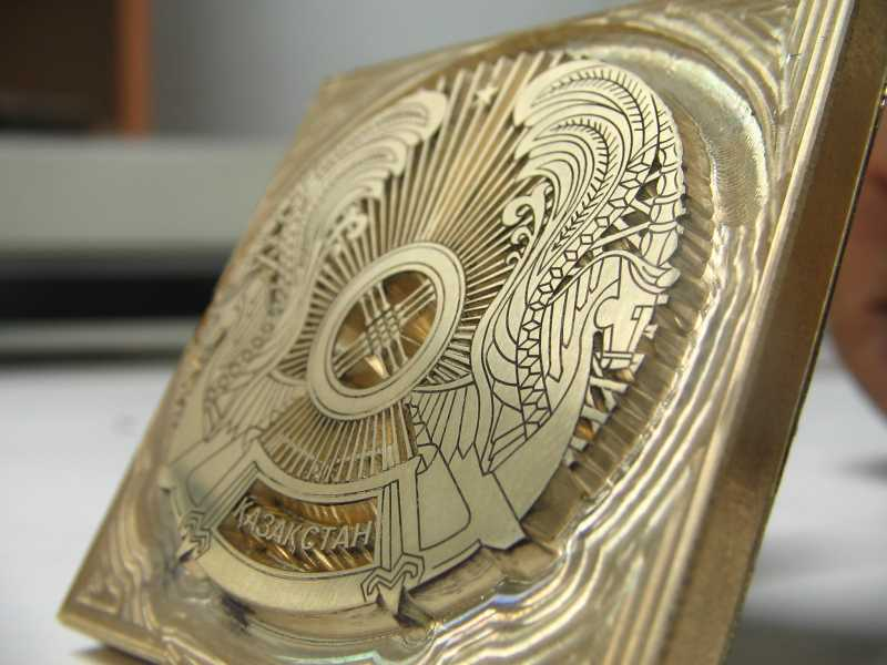 Matryca strukturalna przedstawiająca herb Kazachstanu (zdjęcie w odbiciu lustrzanym aby napis był czytelny). Fotografia matrycy (sama matryca została wykonana przez autora w/w fotografii).